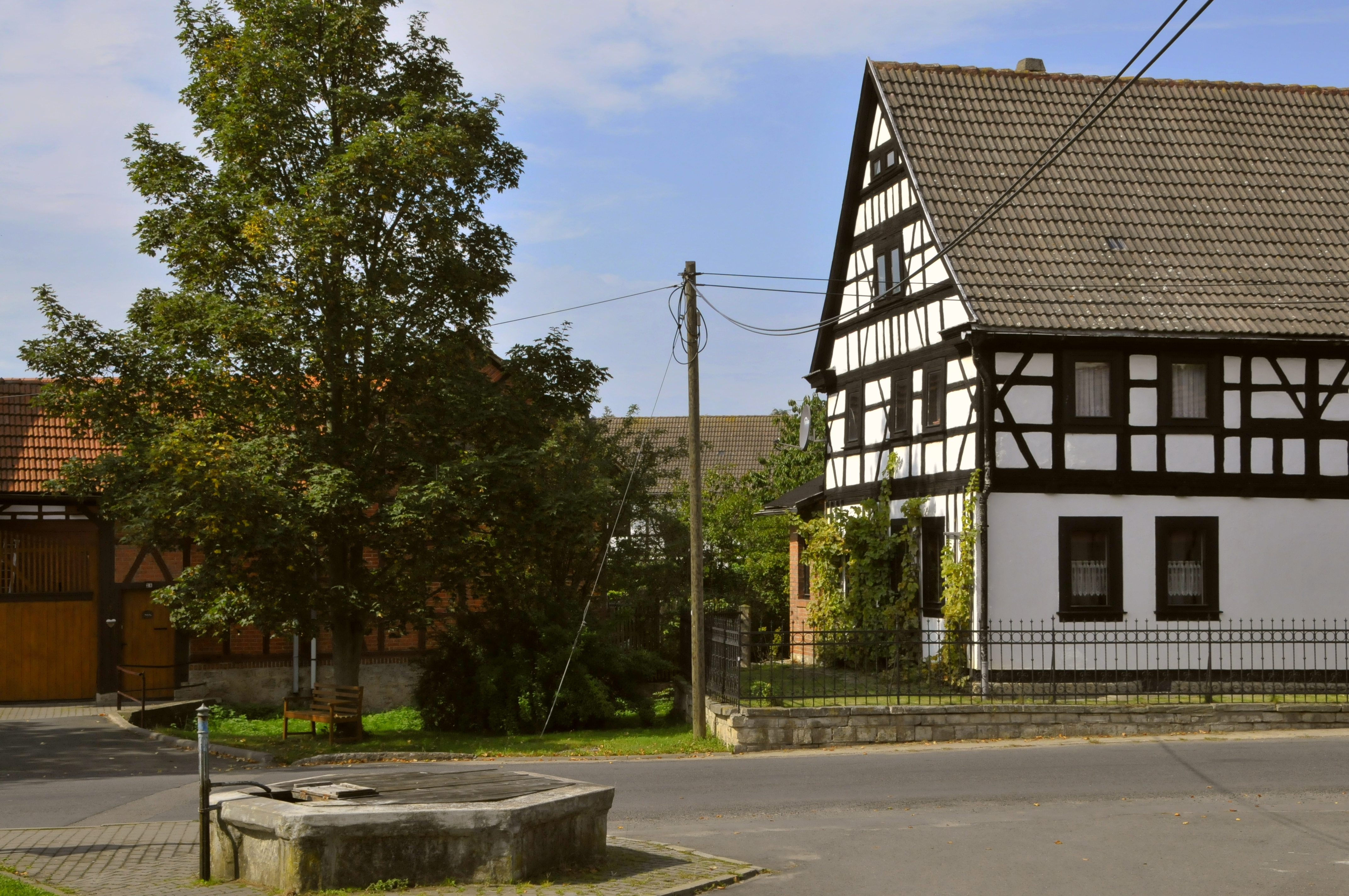 Elleben, Dorfmitte